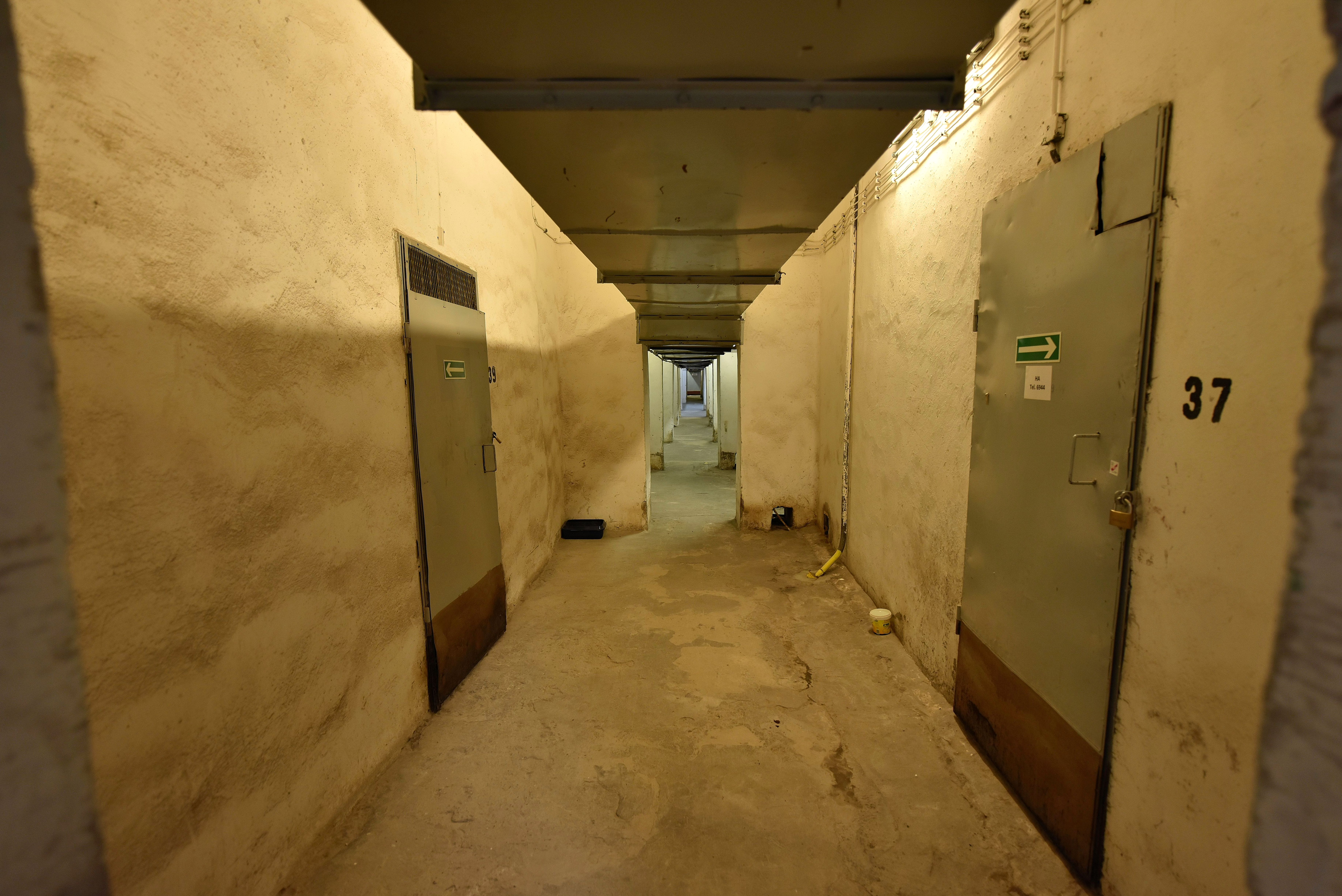 Korytarz na poziomie -2 w Pałacu Kultury i Nauki w Warszawie